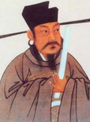 中文（中国大陆）: 宋曹武穆玮